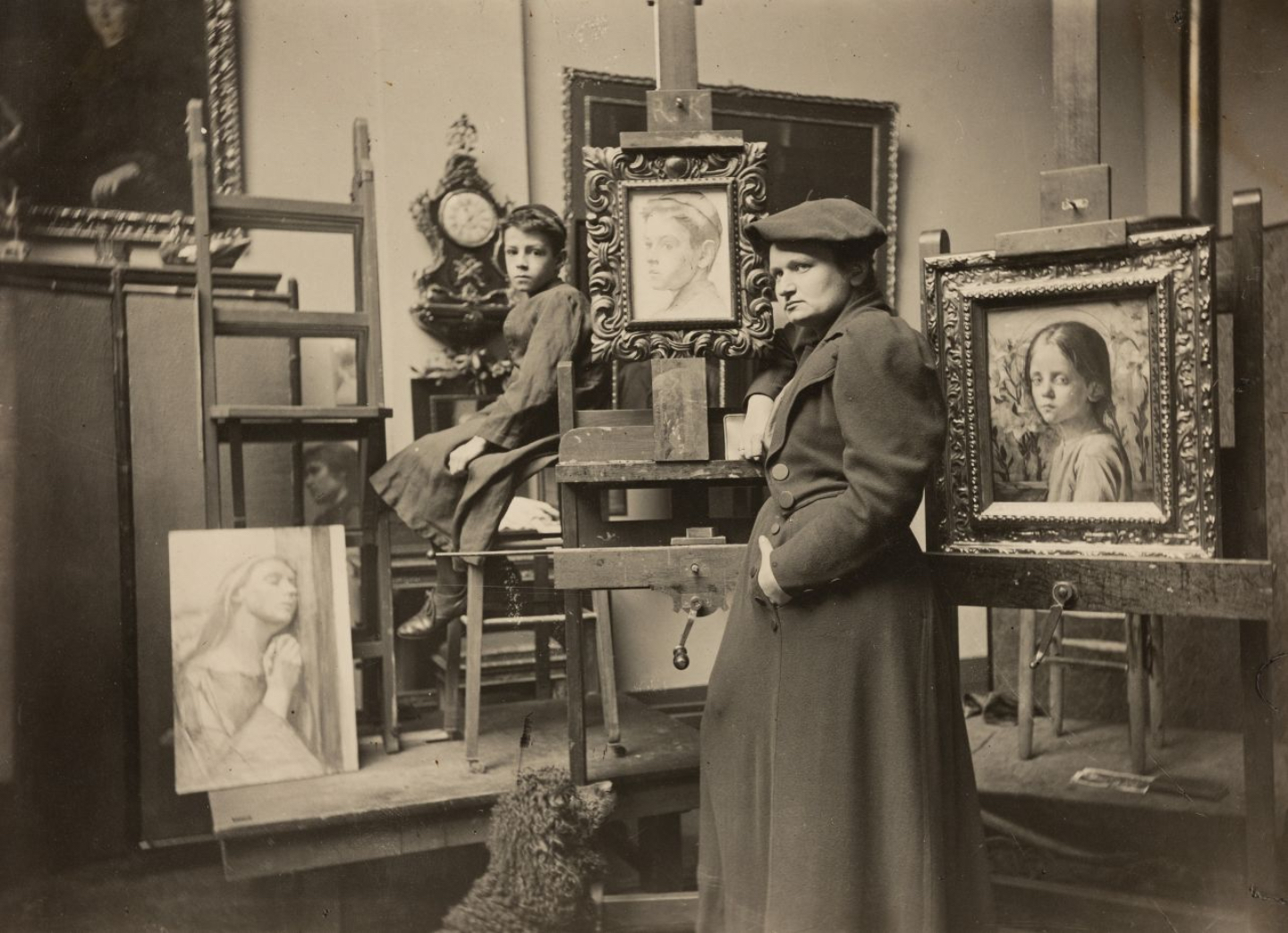 Ottilie Roederstein um 1897 im Atelier der Städelschen Kunstschule in Frankfurt am Main